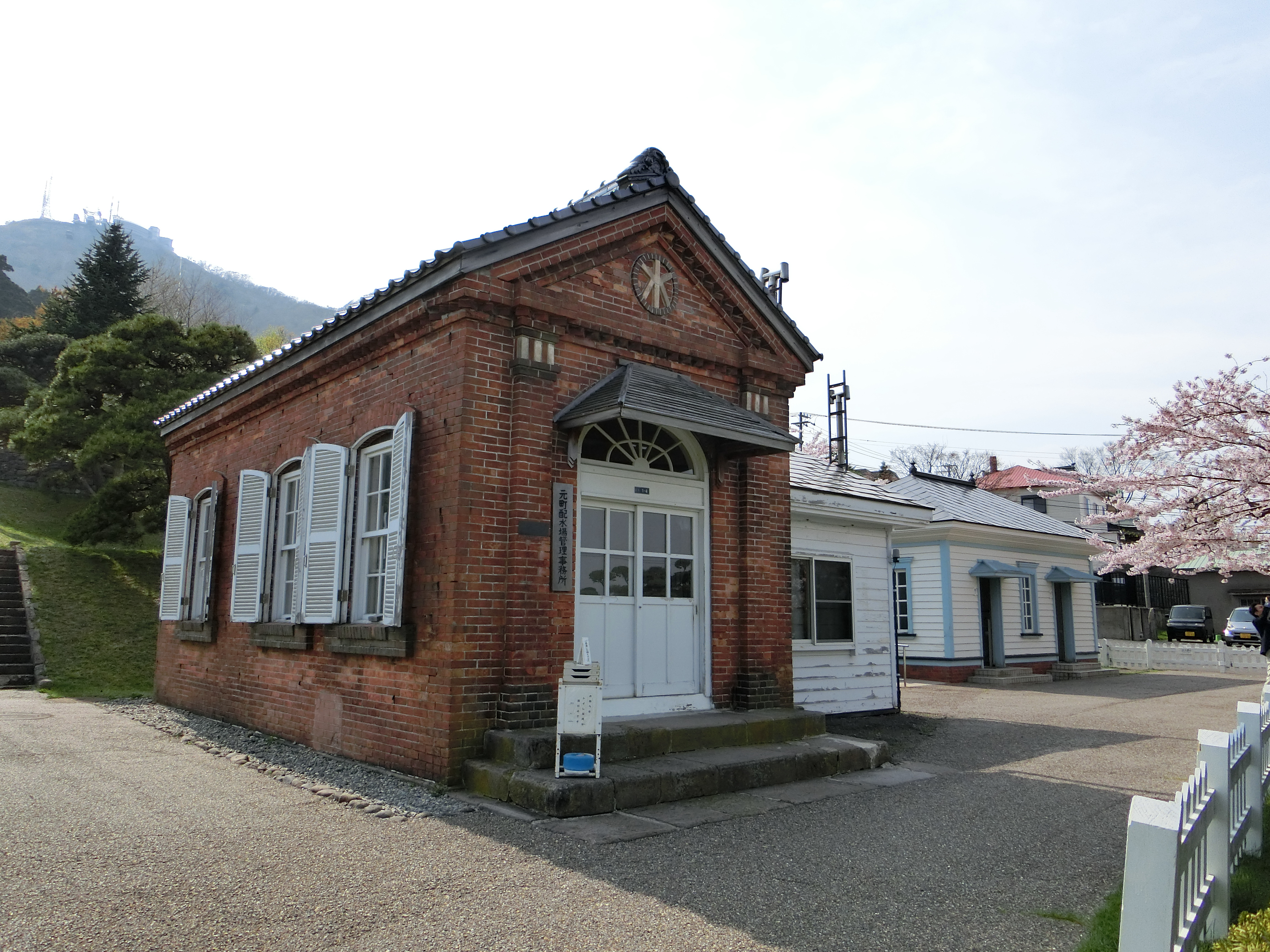 元町配水場の管理棟